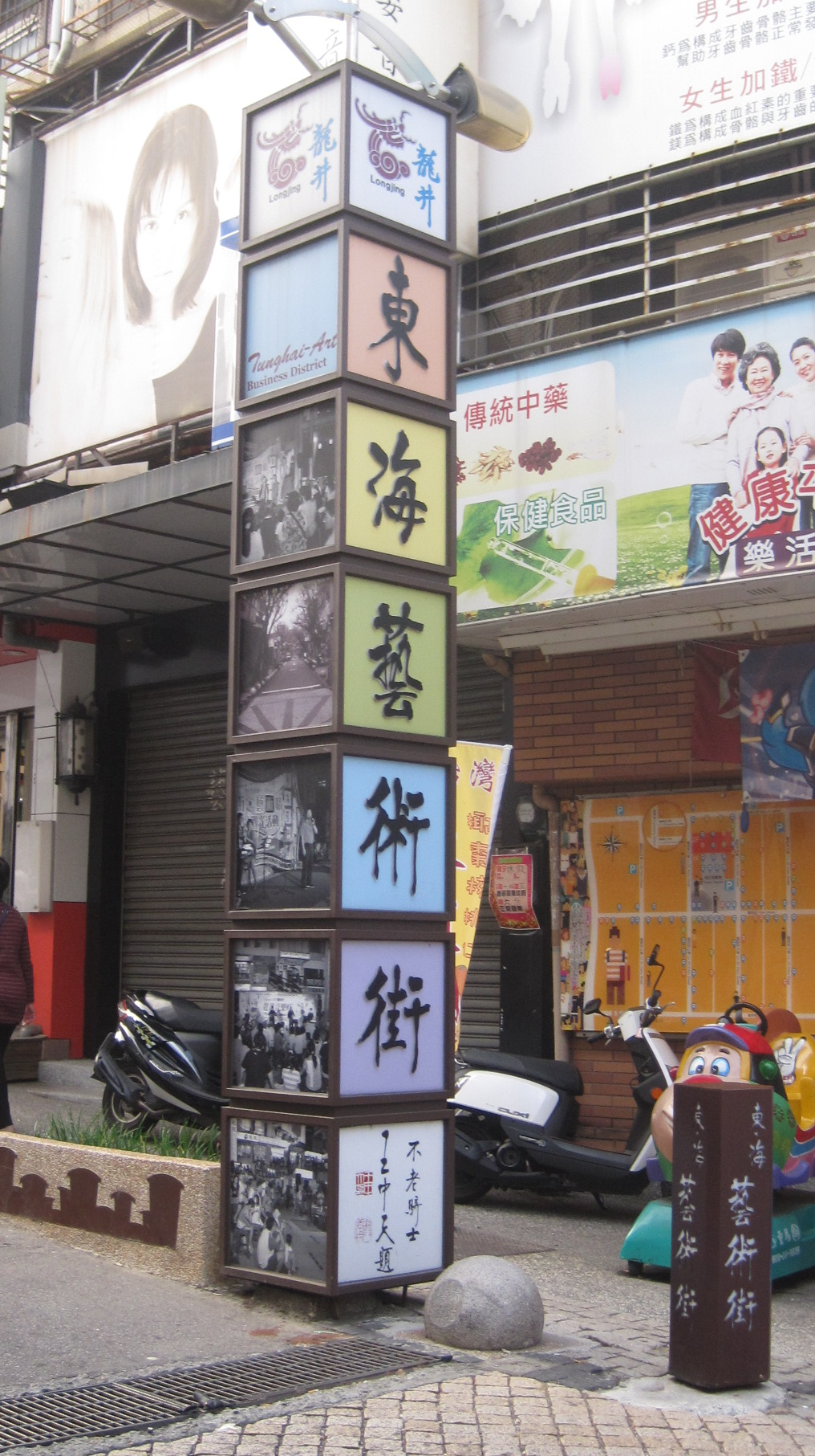 東海藝術街招牌